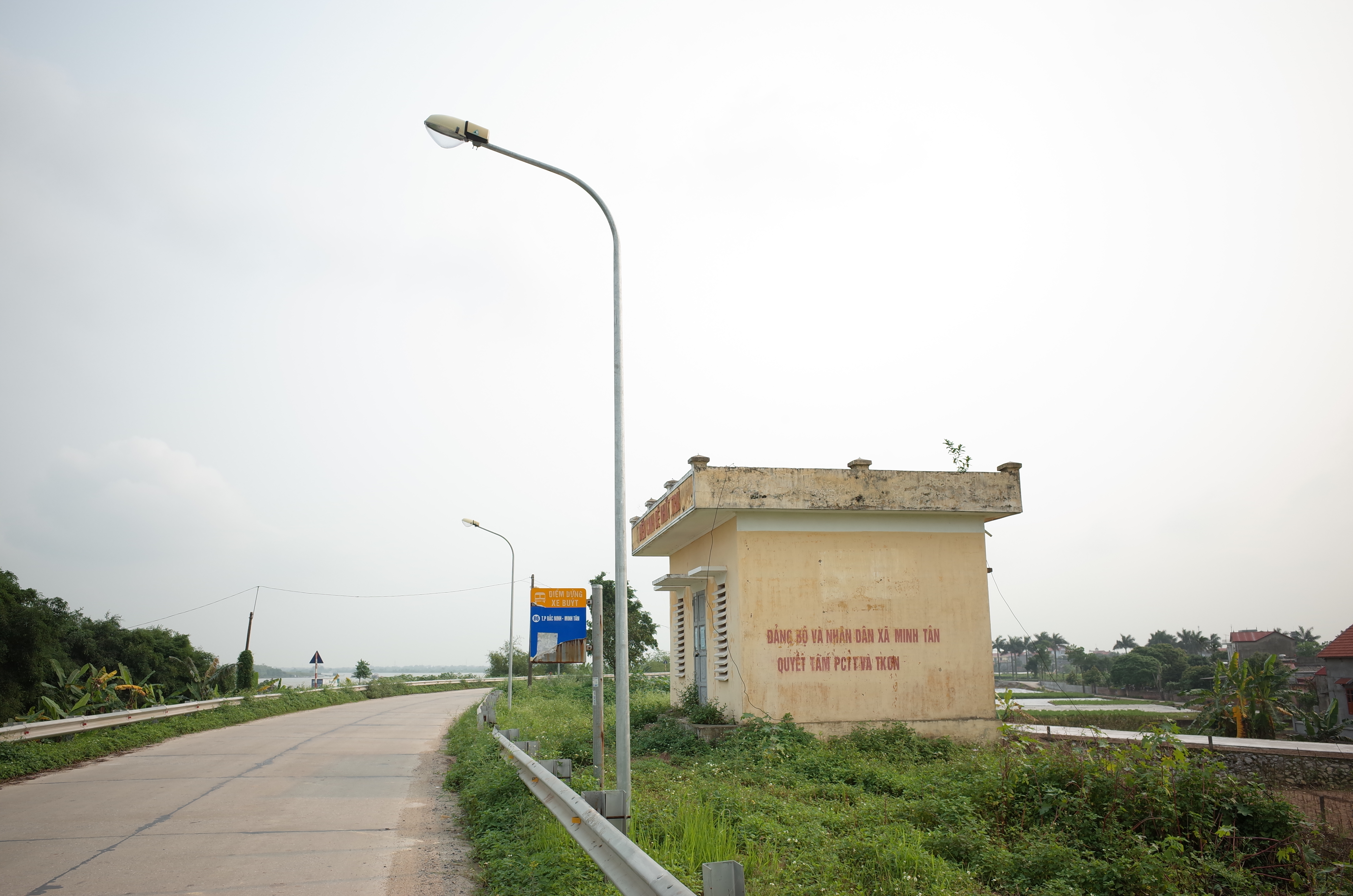 Điểm bắt xe buýt tuyến Bắc Ninh - Minh Tân, cạnh điếm canh đê Nhất Trai, thôn Nhất Trai, xã Minh Tân, huyện Lương Tài, tỉnh Bắc Ninh